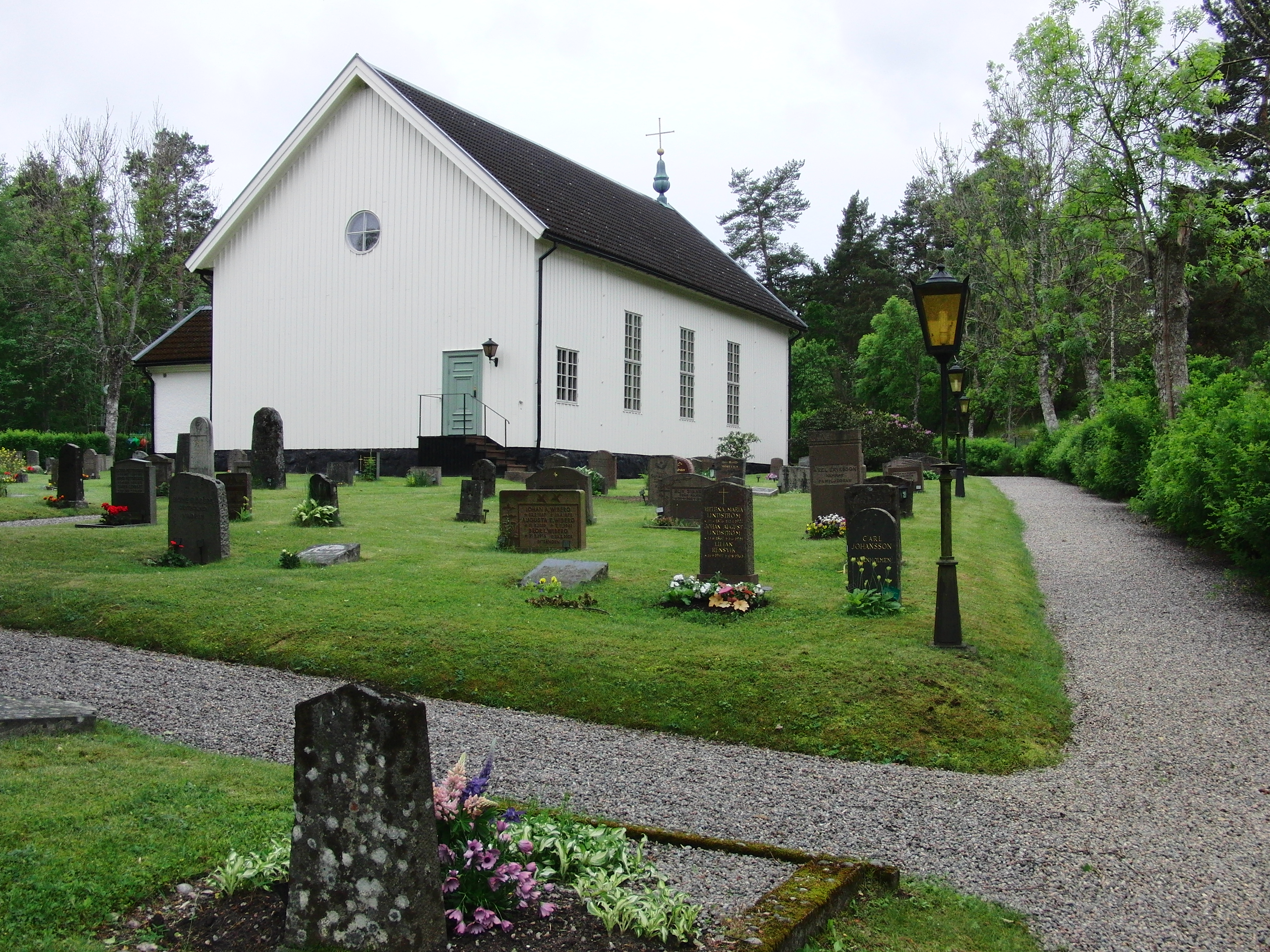 Kyrkobyggnaden har en stomme av trä och står på en stensockel. 1630 invigdes kyrkan och enligt traditionen ska kung Gustav II Adolf ha varit närvarande. Under 1800-talet förföll och genomgick en ombyggnad 1876-1877. En renovering av interiören genomfördes 1952.